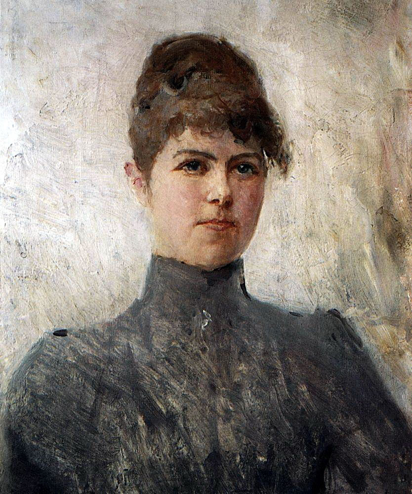 Портрет певицы Марии Яковлевны Ван-Зандт (1861—1919)